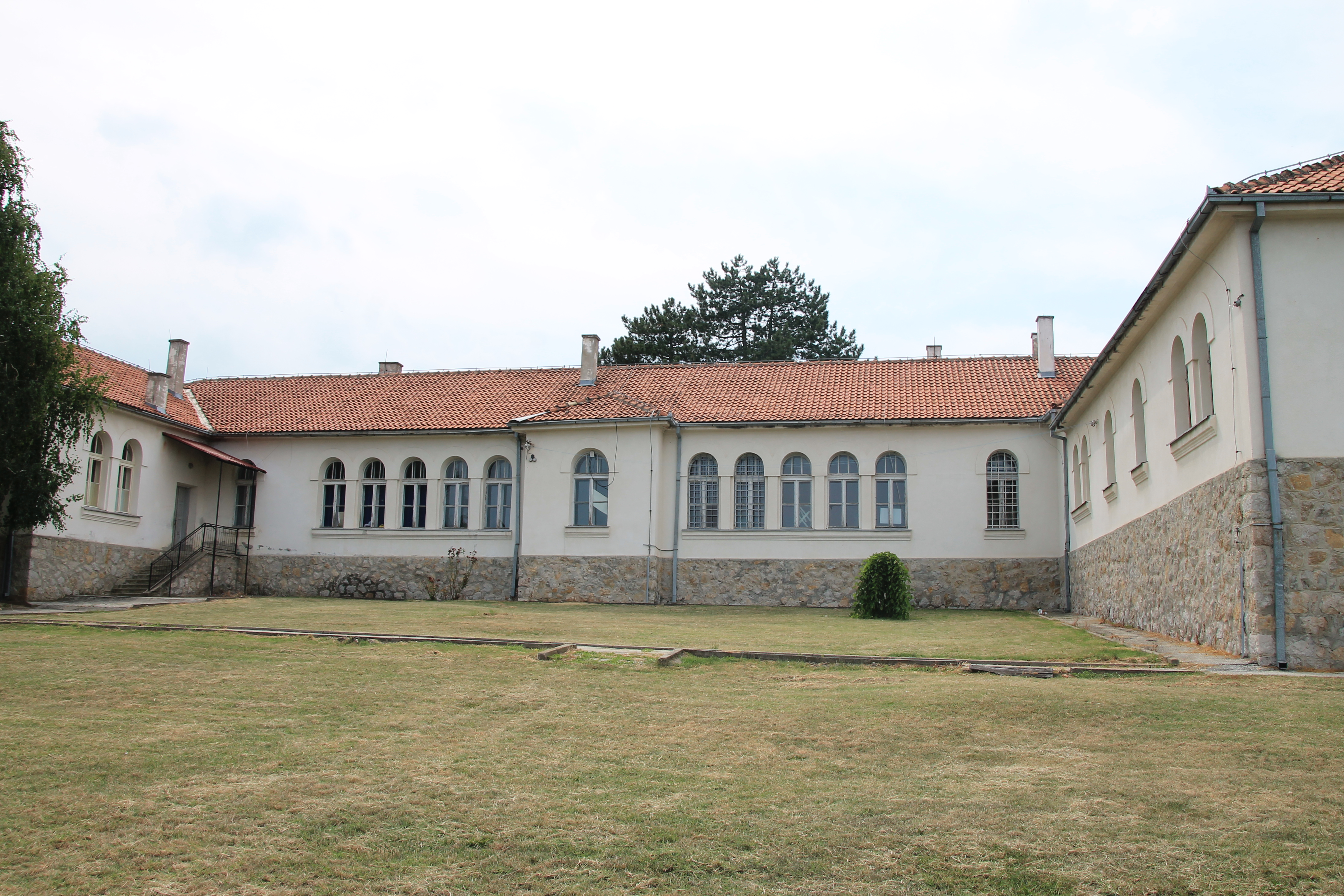 OŠ „Prota Stevan Popović“ Čumić